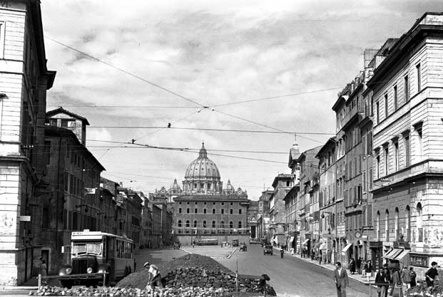 Un momento della costruzione della via nel 1937: al centro della foto si noti il palazzo dei Convertendi, che chiudeva verso Ovest la distrutta piazza Scossacavalli situata al centro della Spina dei Borghi.